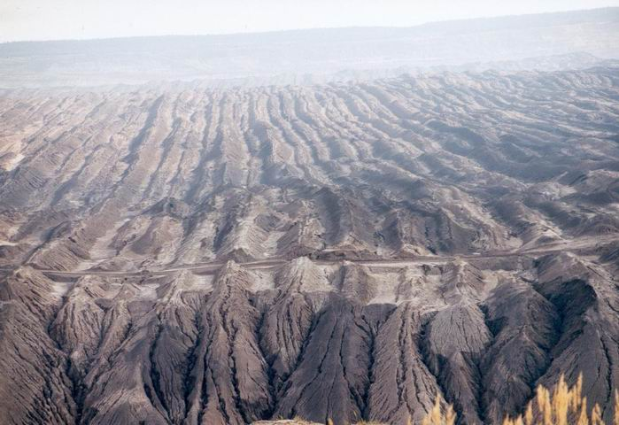 Aufnahme zeigt eine Abraumhalde des Braunkohletagebaus Großräschen